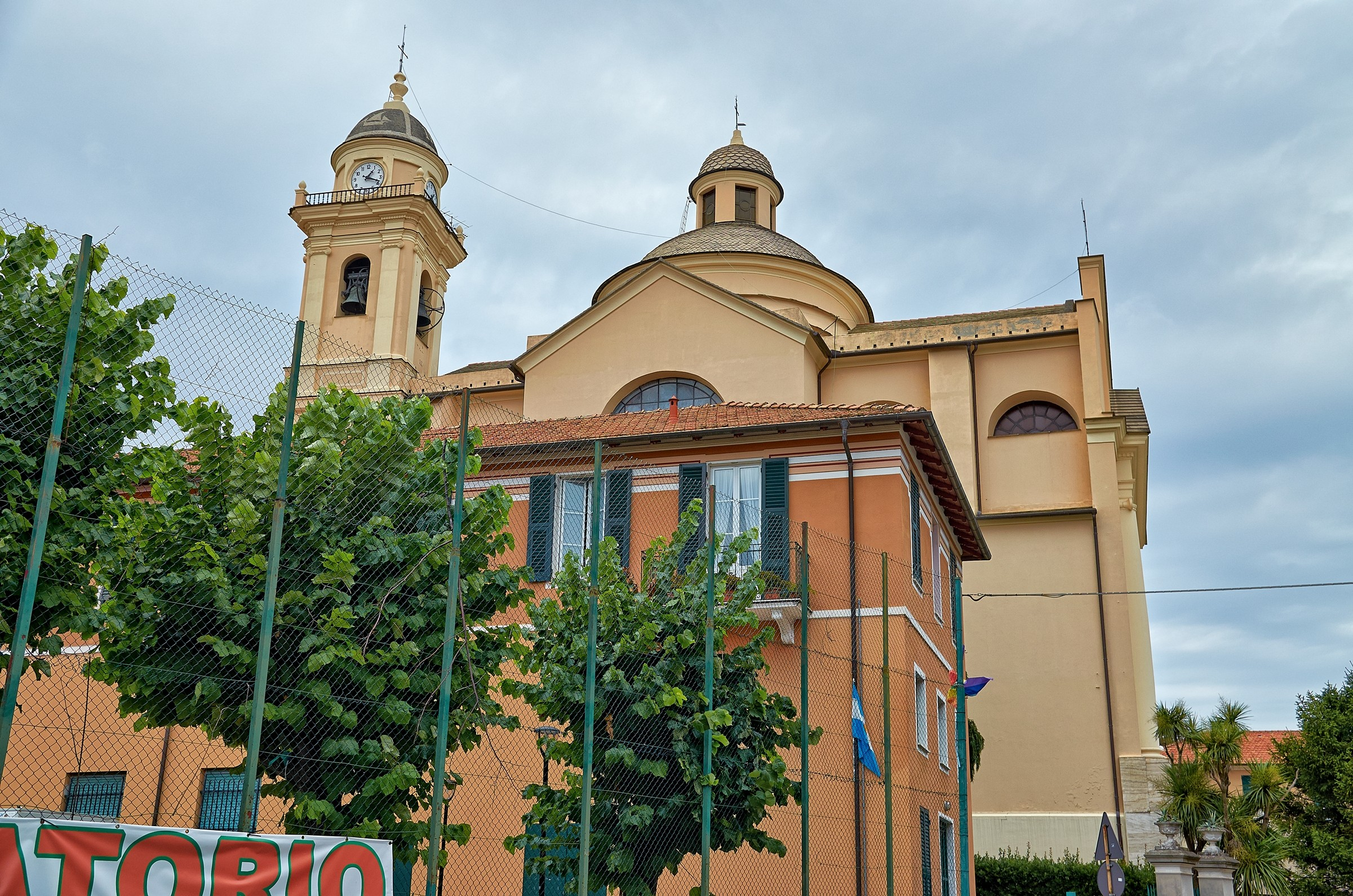 Chiesa di San Bartolomeo, vista sulla cupola e campanile